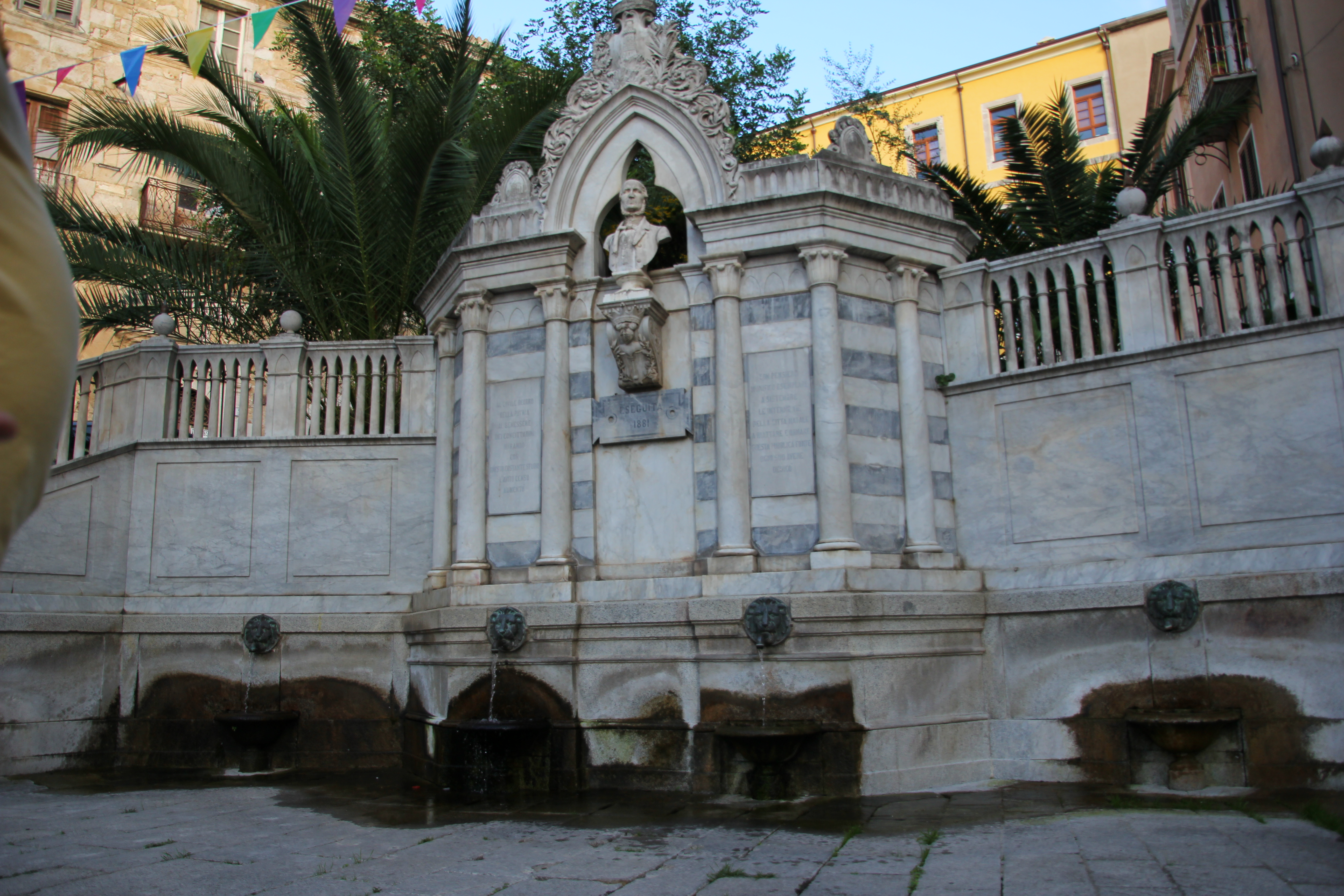 Ozieri - Fontana Grixoni